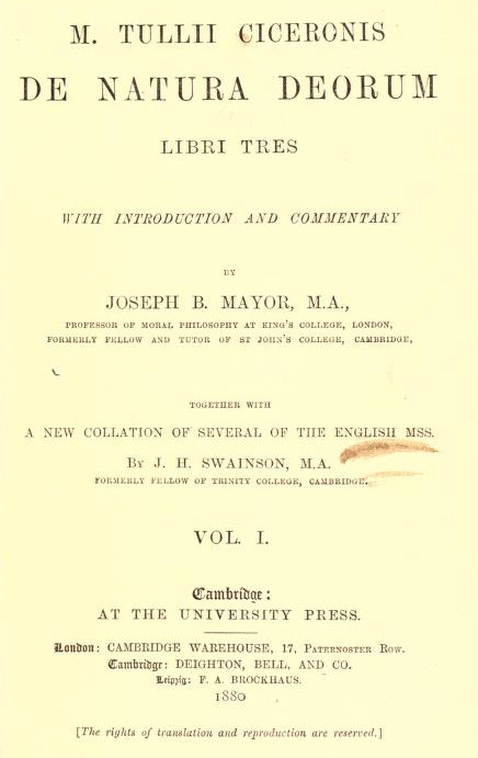 Strona tytułowa najstarszej krytycznej edycji De natura deorum Cycerona z 1880 roku.